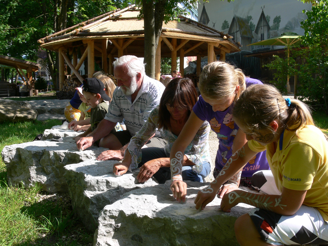 Schleifen von Bernsteinen und Fossilien erfordern keine spezifischen Fertigkeiten: Besucher beim „steinzeitlichen Handwerkern“.